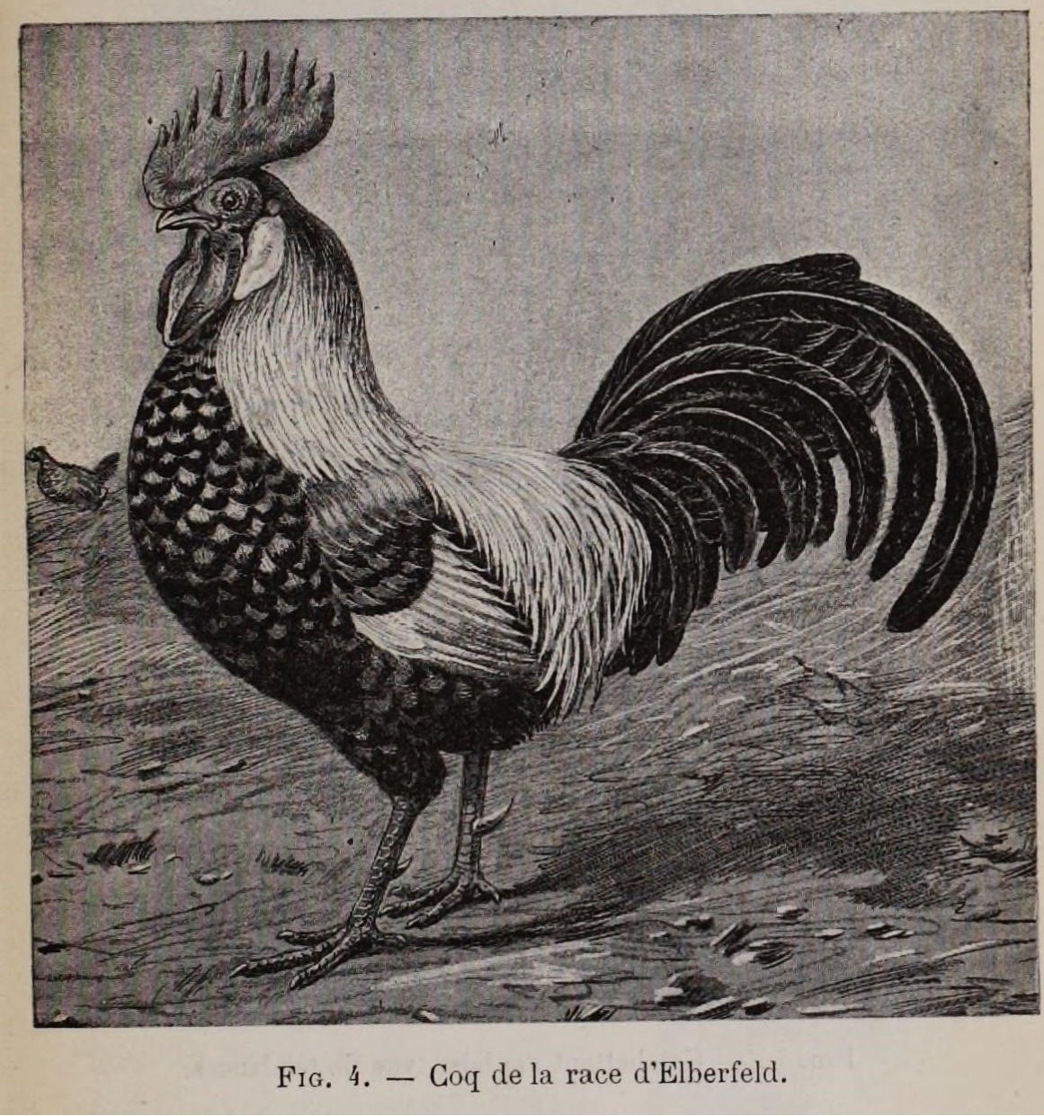 Afbeelding: Coq de la race d'Elberfeld